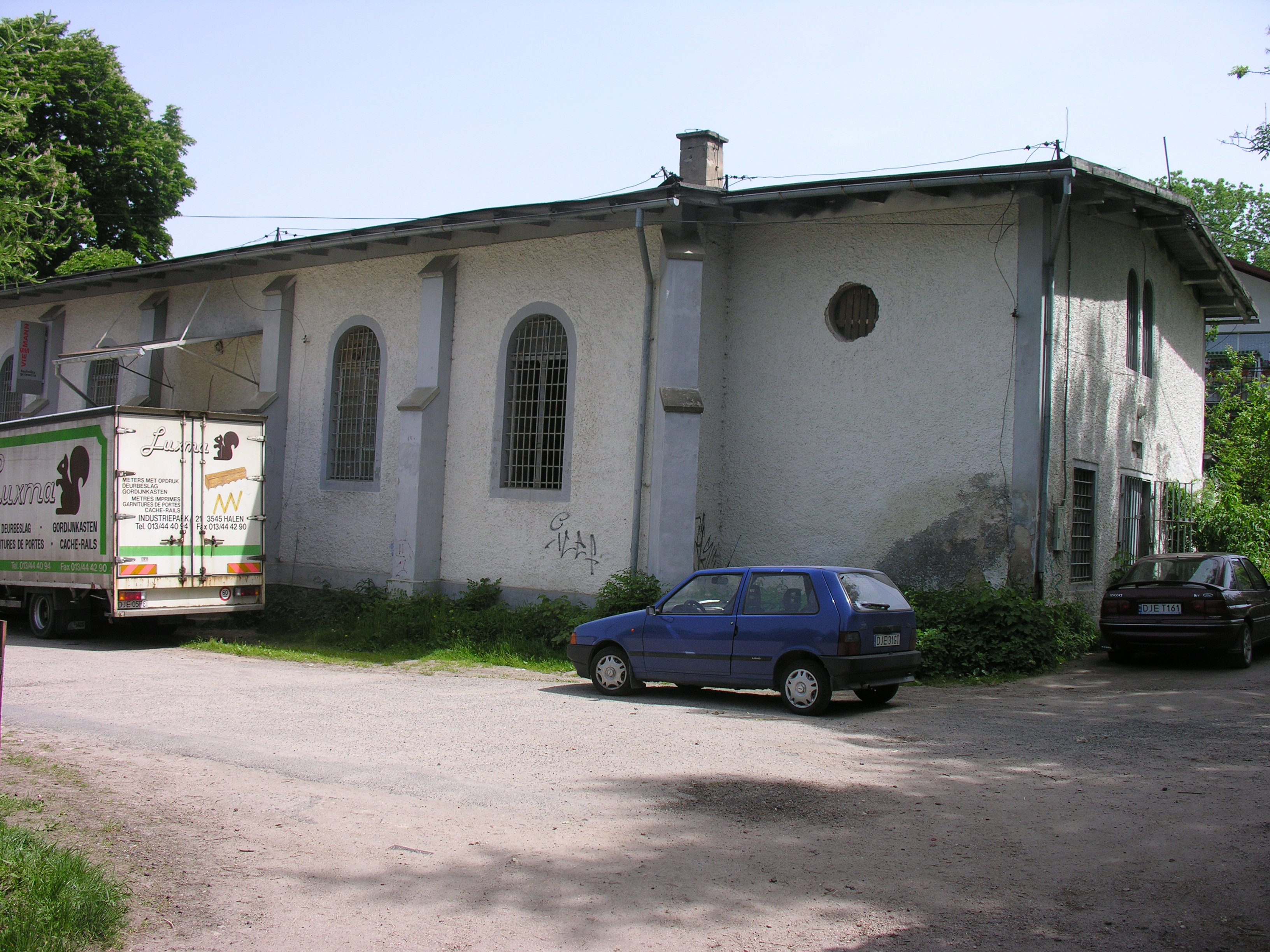 Synagoga w Kowarach